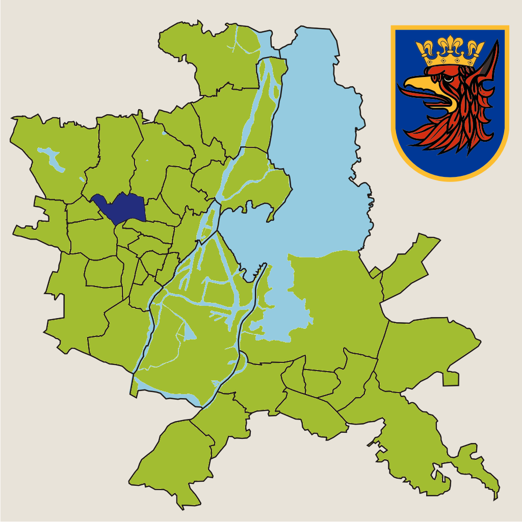 Osiedle "Arkońskie-Niemierzyn" w Szczecinie – jednostka pomocnicza miasta w 2010